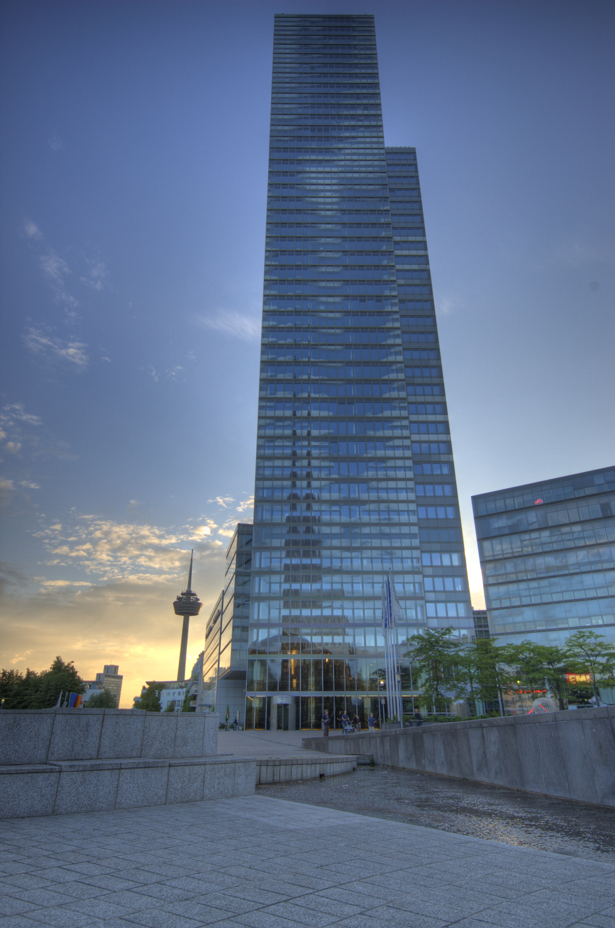 Kölnturm